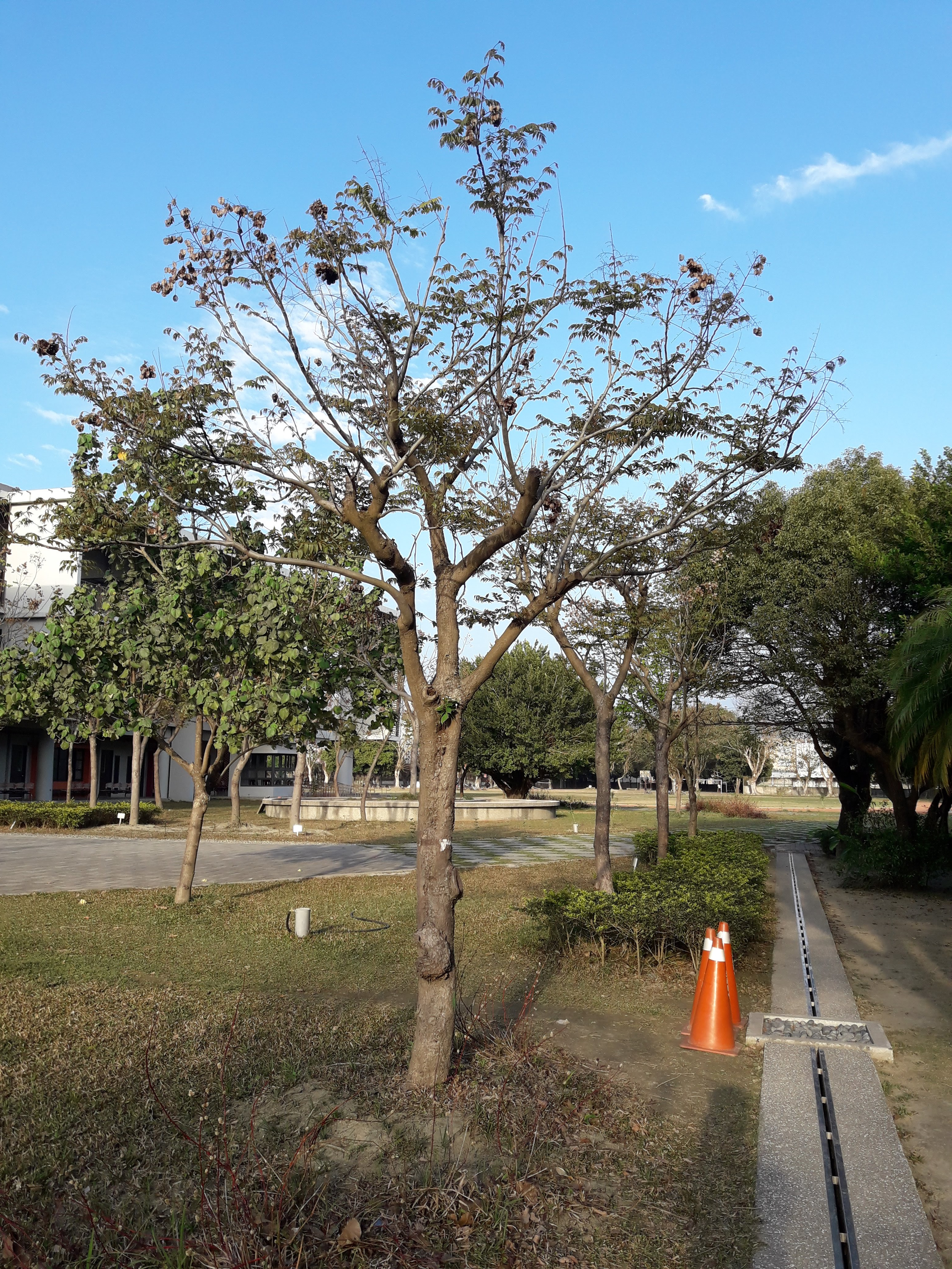 孟春時節雲林縣立土庫國民中學校園裡的臺灣欒樹。